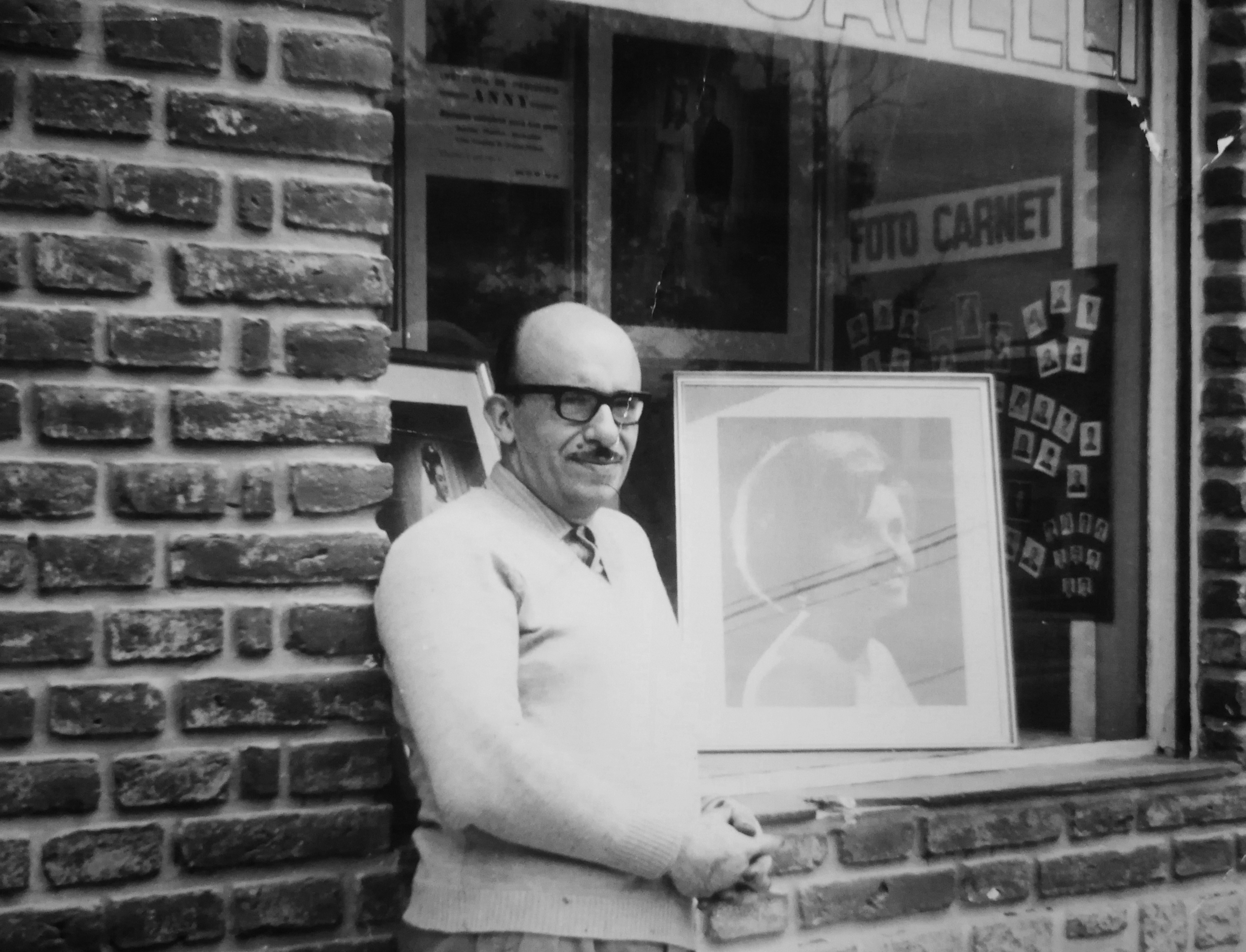 Esta imagen es un retrato de Luis Savelli, realizado por Estela Mary Casé, frente al Estudio Fotográfico Savelli en Guaymallén, Mendoza. (1967)